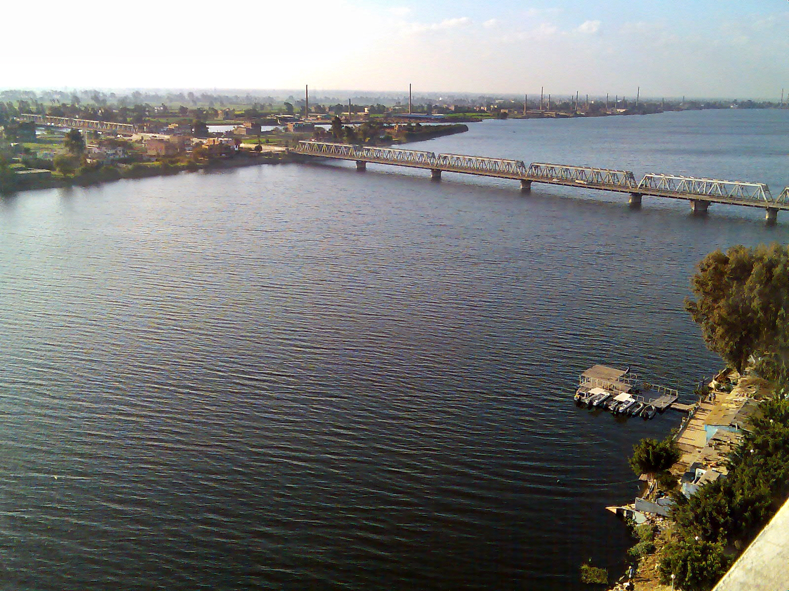 كوبري دسوق القديم من الجانبين وجزيرة الرحمانية في الوسط